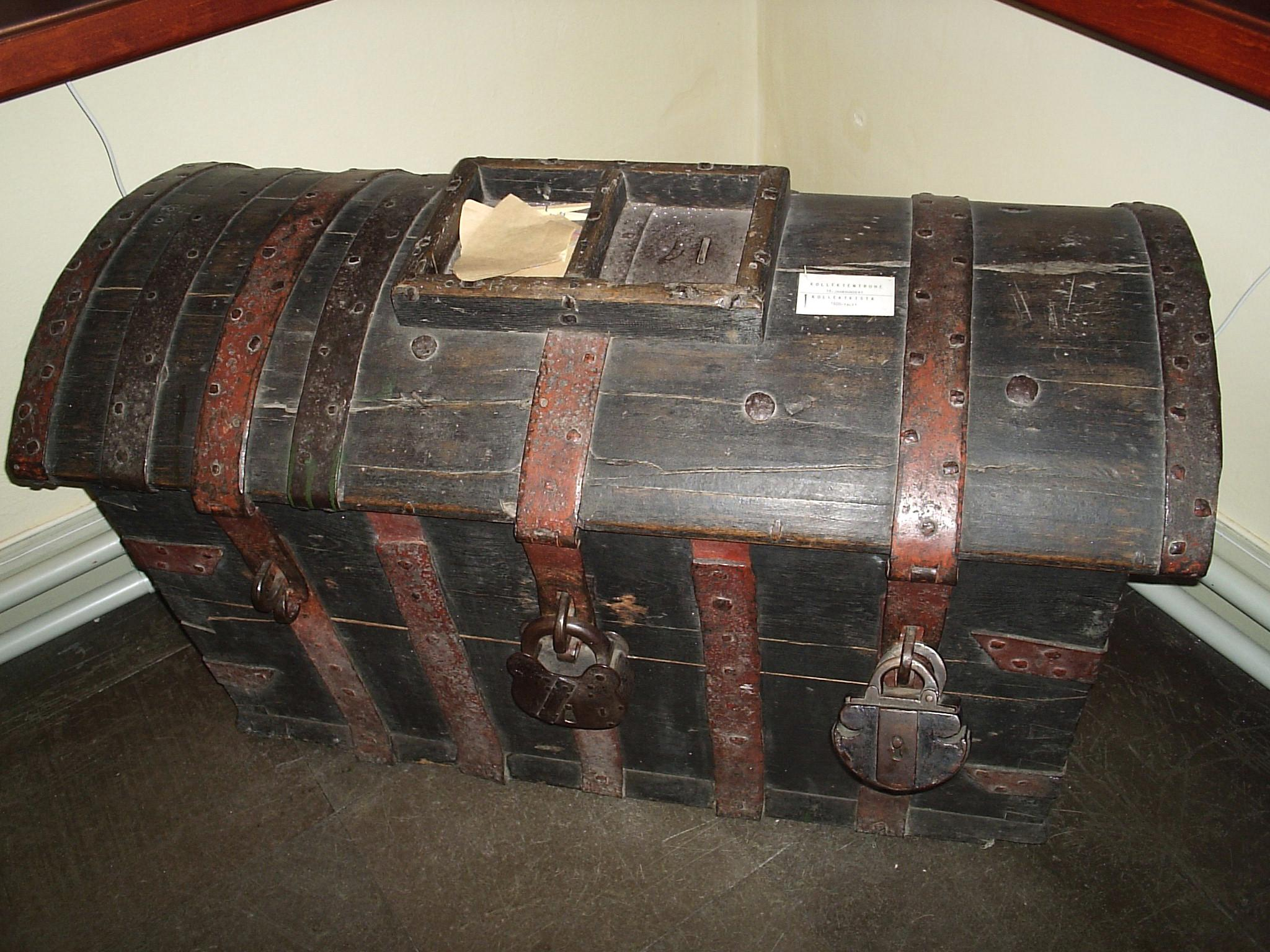 Kollektkista från 1600-talet i Tyska kyrkan i Göteborg, den 13 september 2005. Bilden är fotograferad av Harri Blomberg.